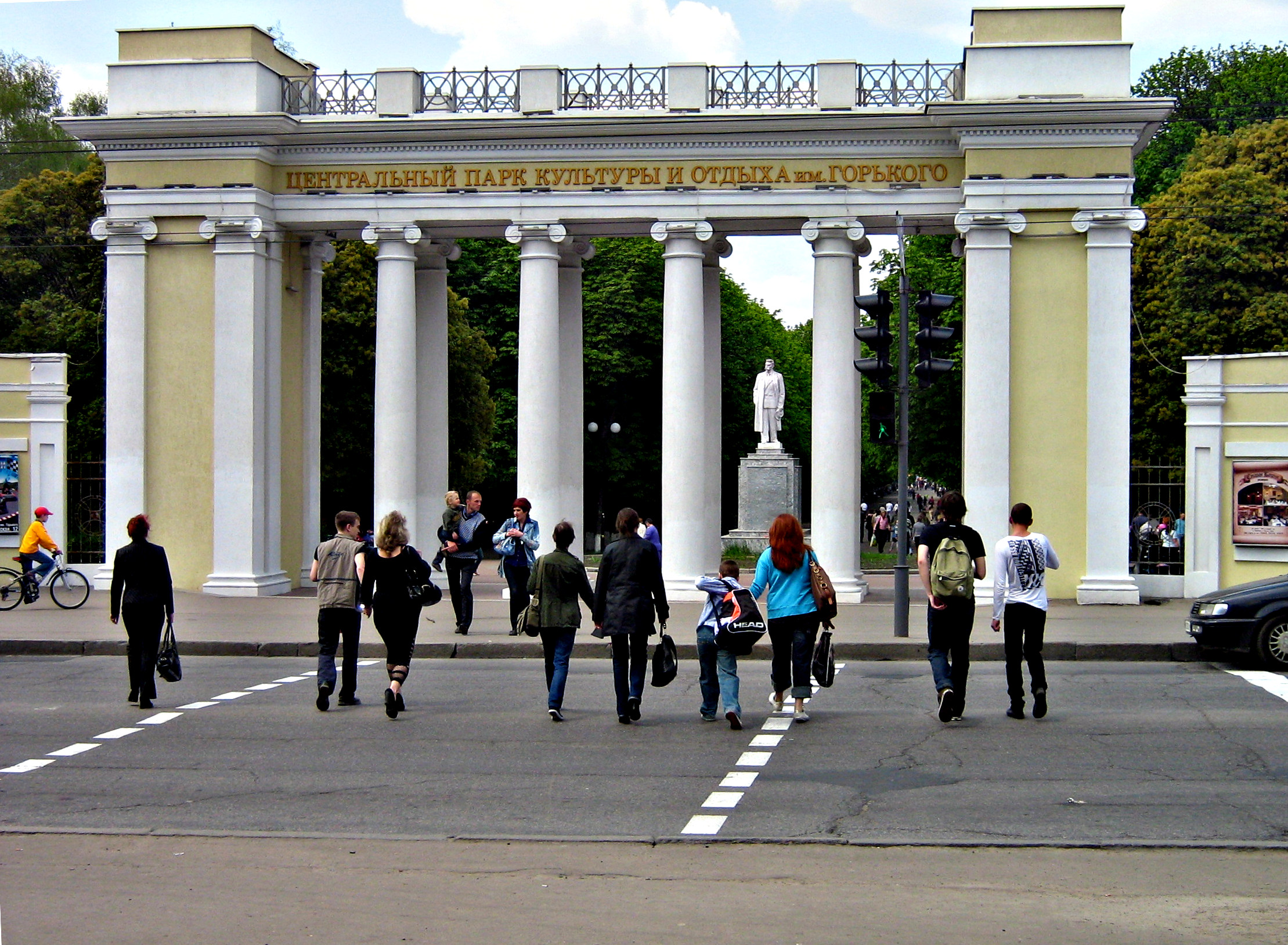 Центральный вход в парк имени Горького (восстановленная колоннада). Харьков, Украина. 2010 год.